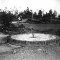 Bundesgartenschau 1957 in Köln - Brunnenhof